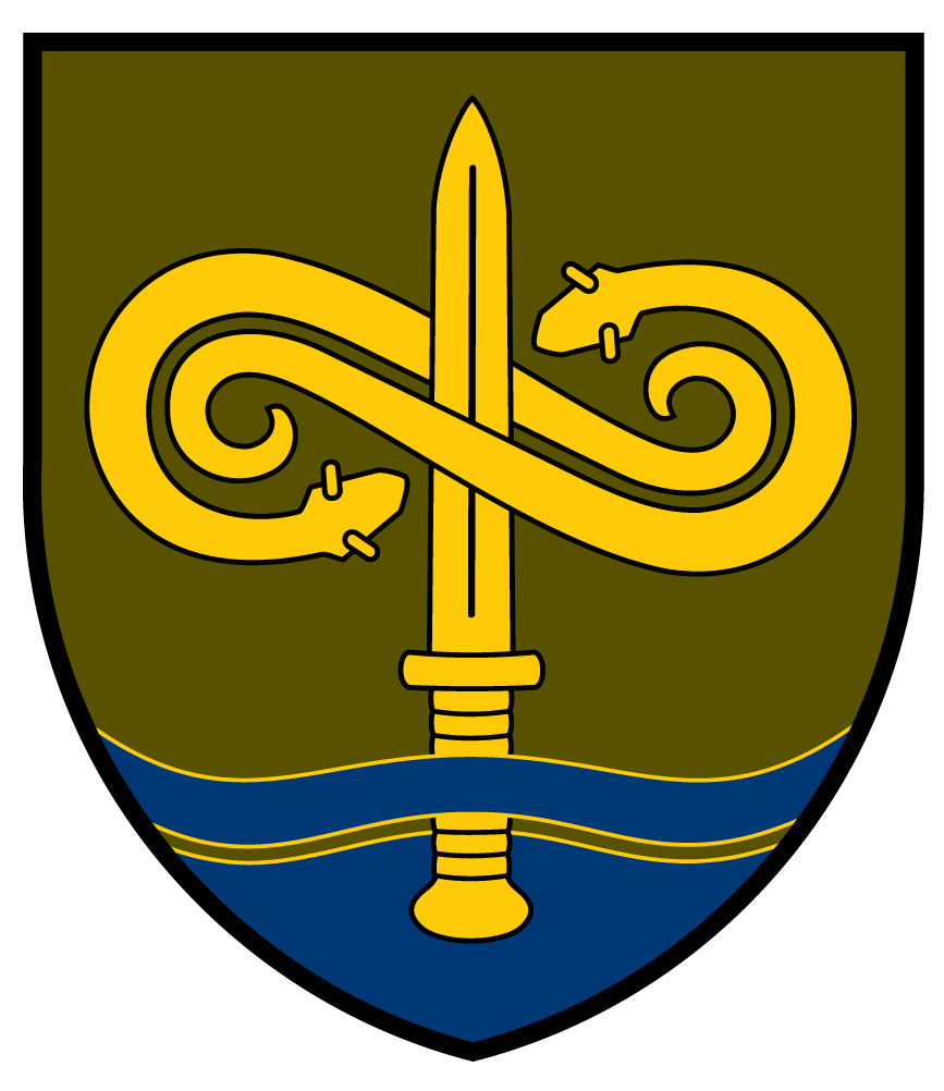 Kovinių narų tarnyba (KNT)